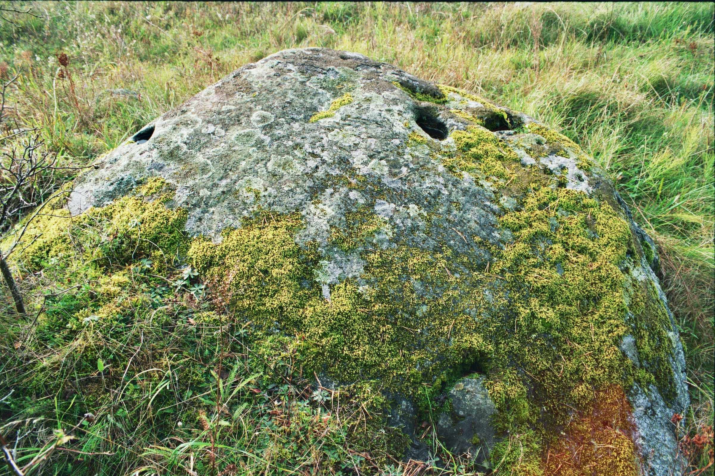 Rahvapärimustega seotud kivi "Kuradikivi"